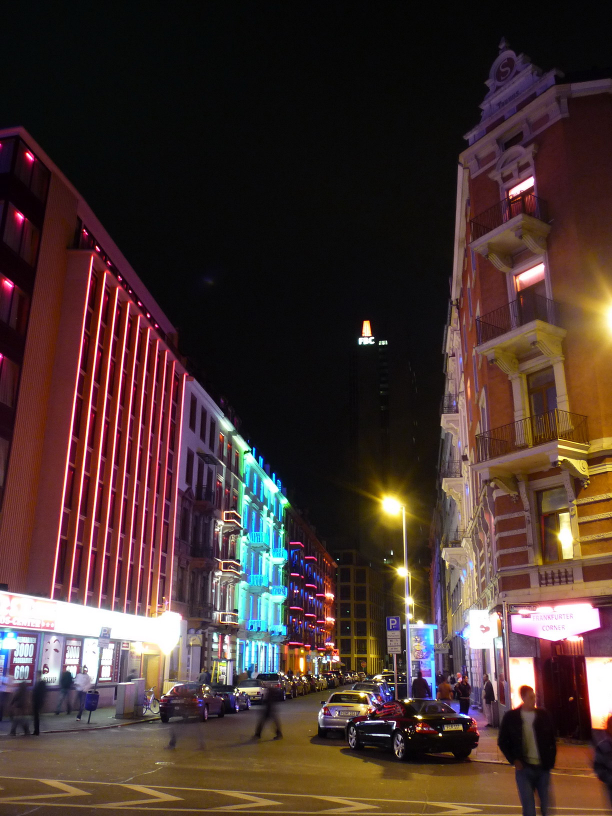 Frankfurt Bahnhofsviertel, Taunusstraße Ecke Elbestraße